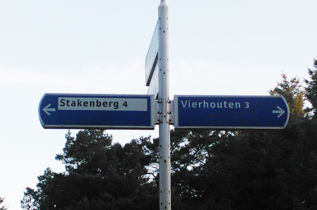 Stakenberg